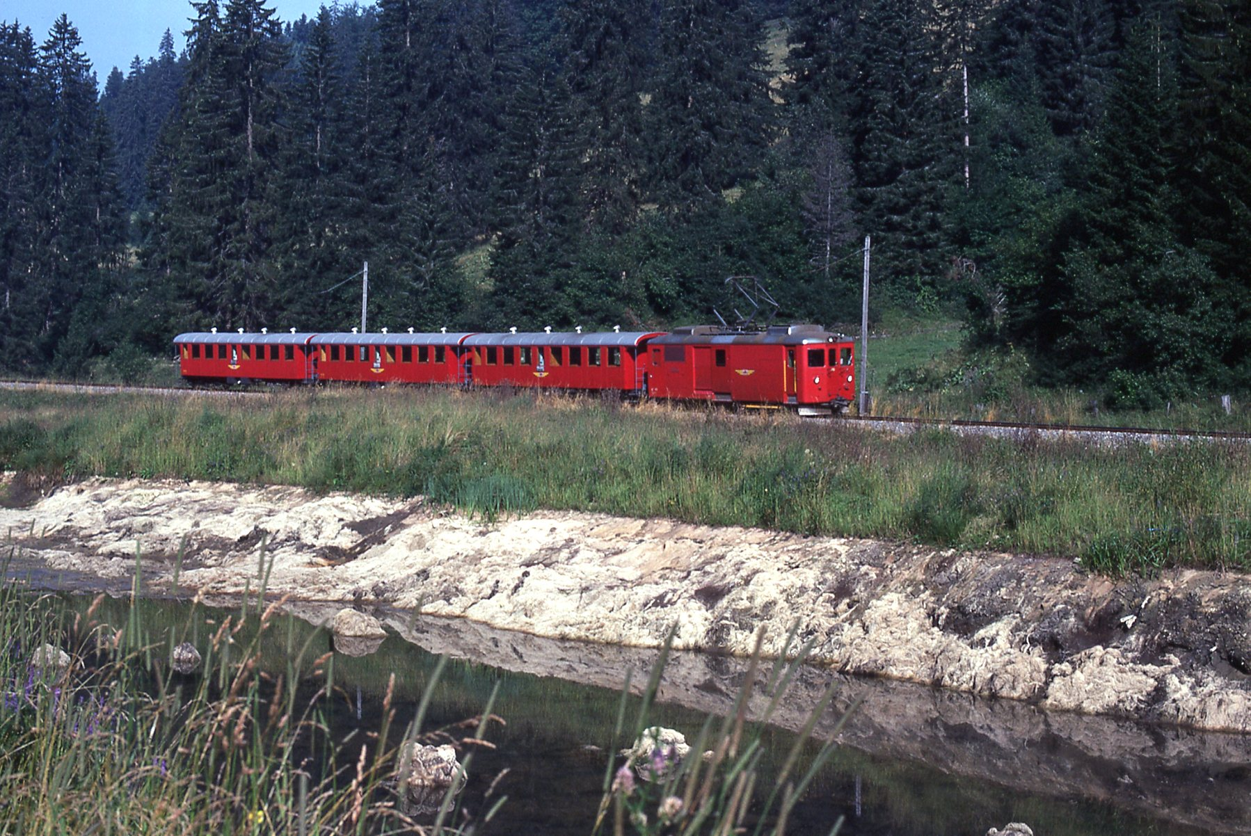 Photo: Trams aux Fils. Prise en août 1977 La ligne du C.J. Chemin de Fer du Jura à été construite entre 1884 et 1913 à voie métrique, sa longueur et de 51,1 Kilomètres